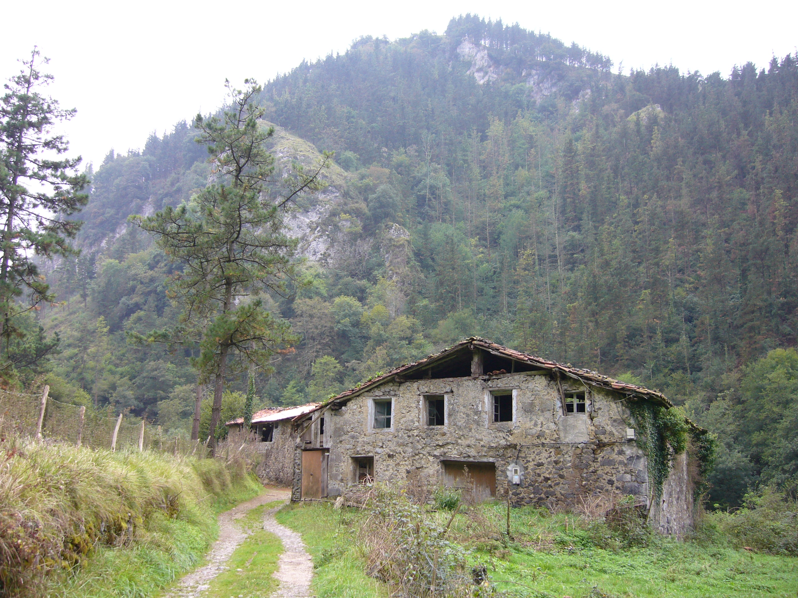 Errezabalgo Aztiaren baserria, Aiako altzola auzoan.